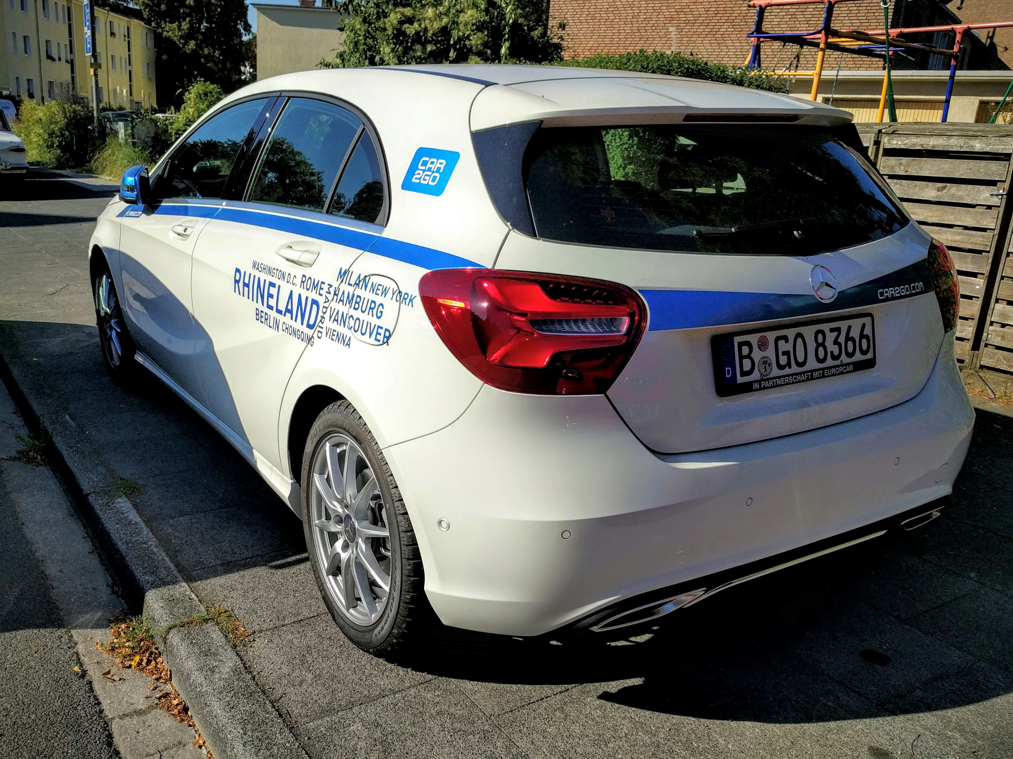 Car2Go Mercedes Benz A-Klasse (Car2Go Rheinland), Heckansicht